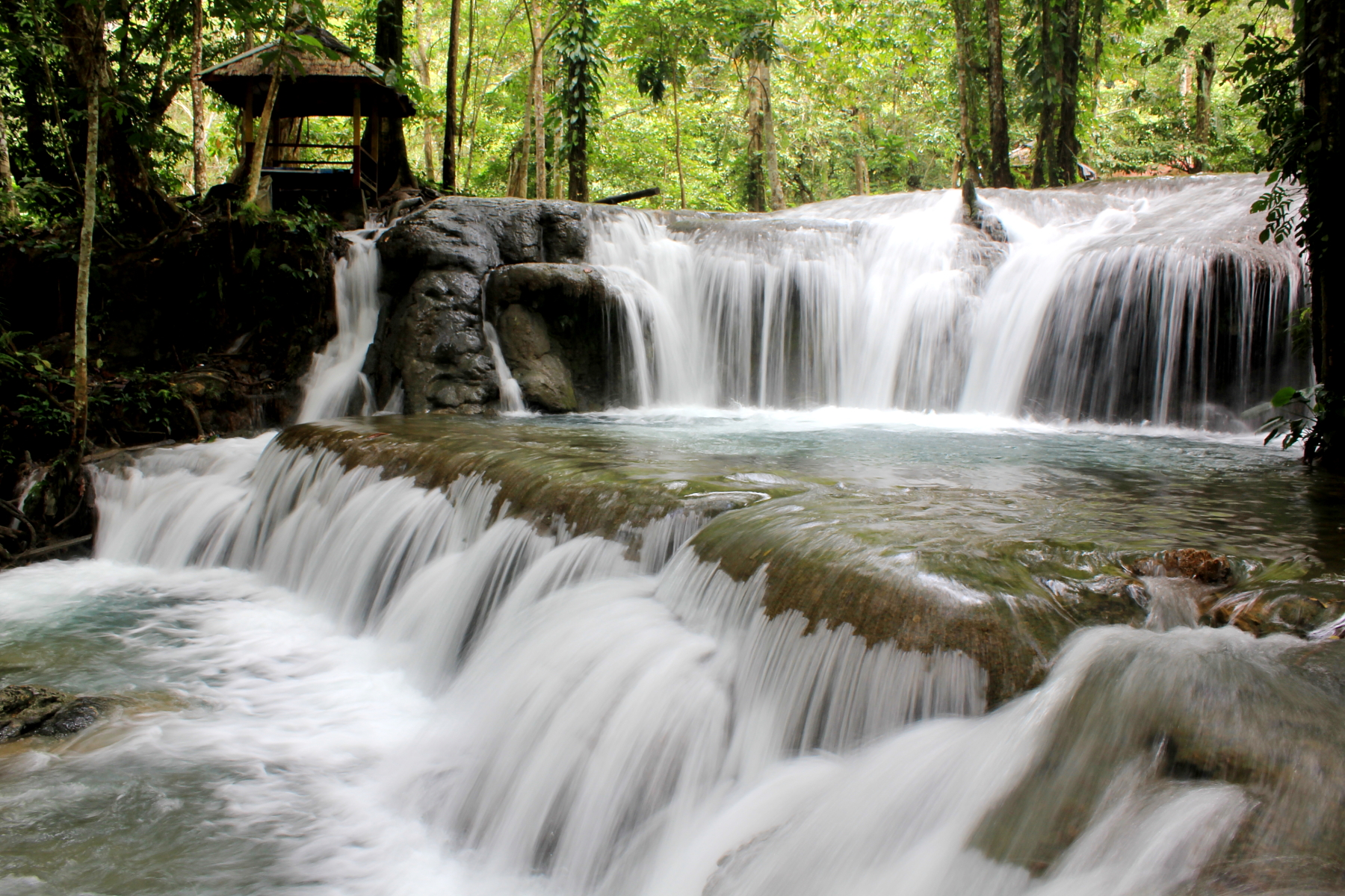 Air terjun Salodik, Luwuk